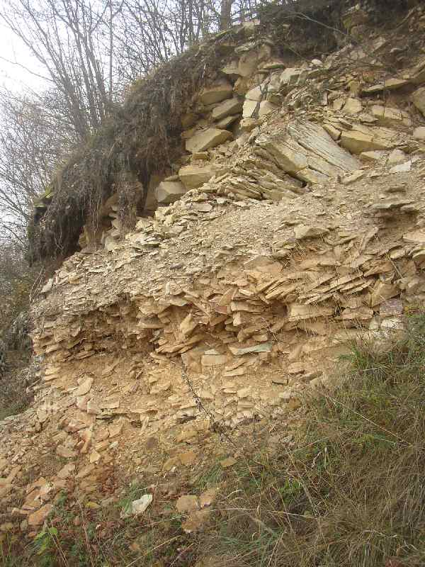 Přírodní památka Opukový lom u Přední Kopaniny v Praze. Opukový výchoz nad přístupovou cestou k lomu.